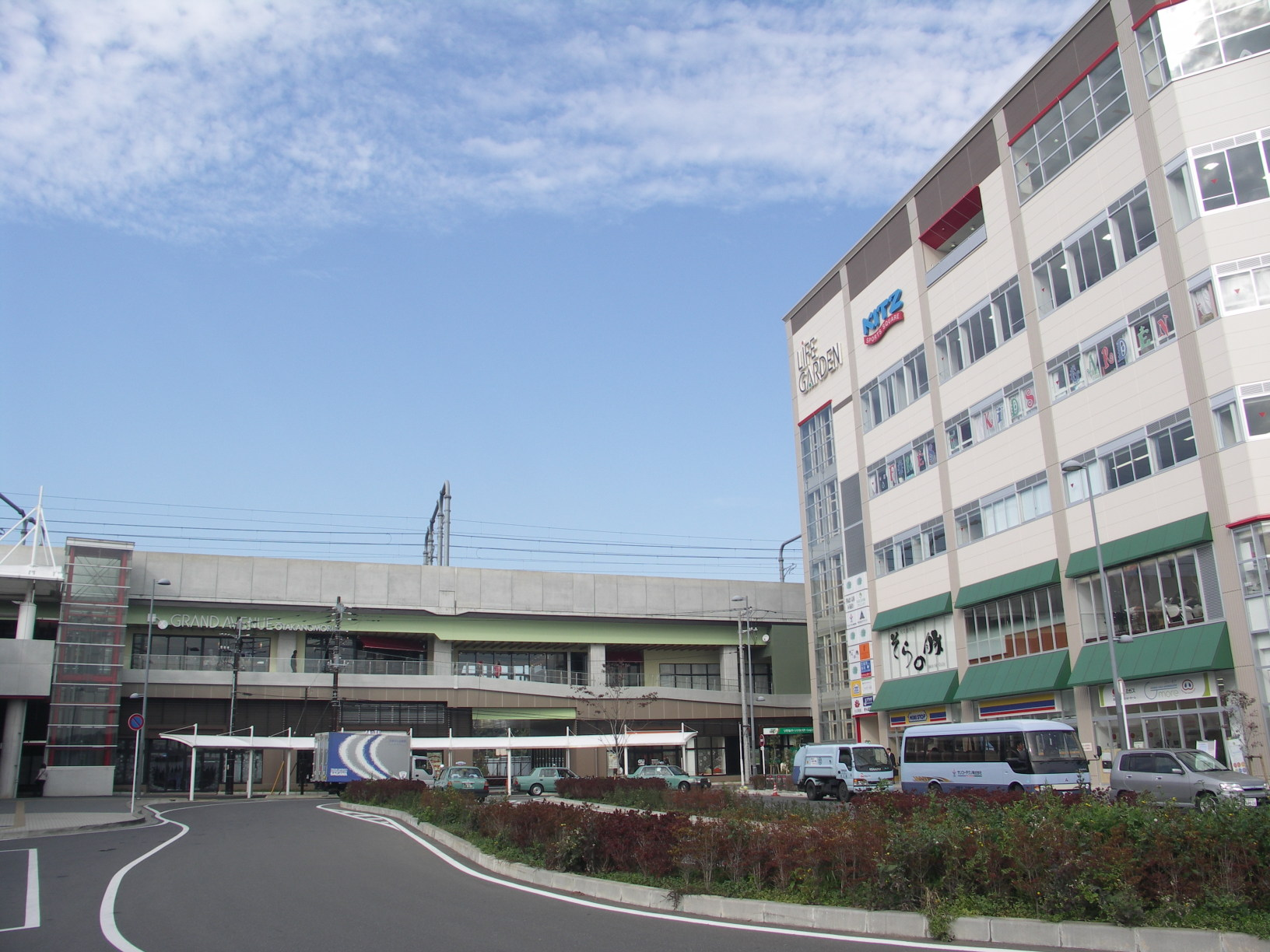 TX GRAND AVENUE OTAKANOMORI and LIFE GARDEN Nagareyama Otakanomori, TXグランドアベニューおおたかの森とライフガーデン流山おおたかの森